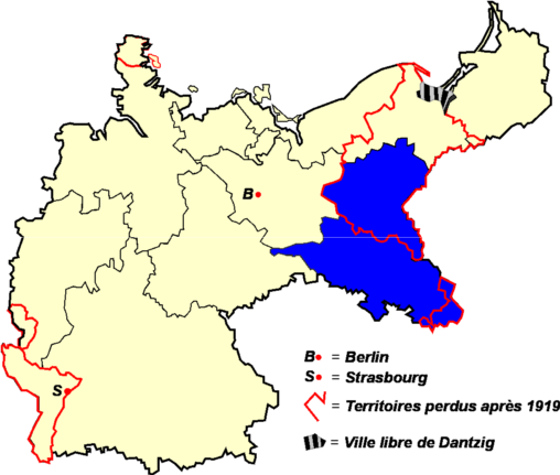 Territoires couverts par la Fédération de football d'Allemagne du Sud-Est de 1905 à 1933 Catégorie:Logo Fédérations Allemandes de Football